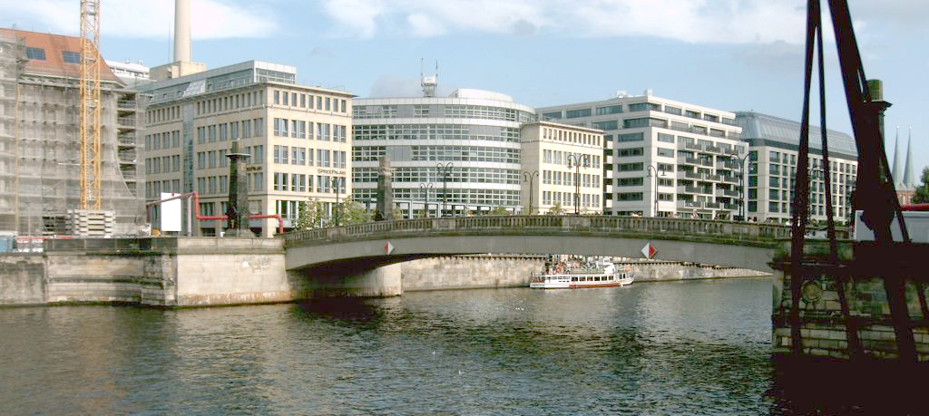 Friedrichsbrücke Berlin-Mitte.